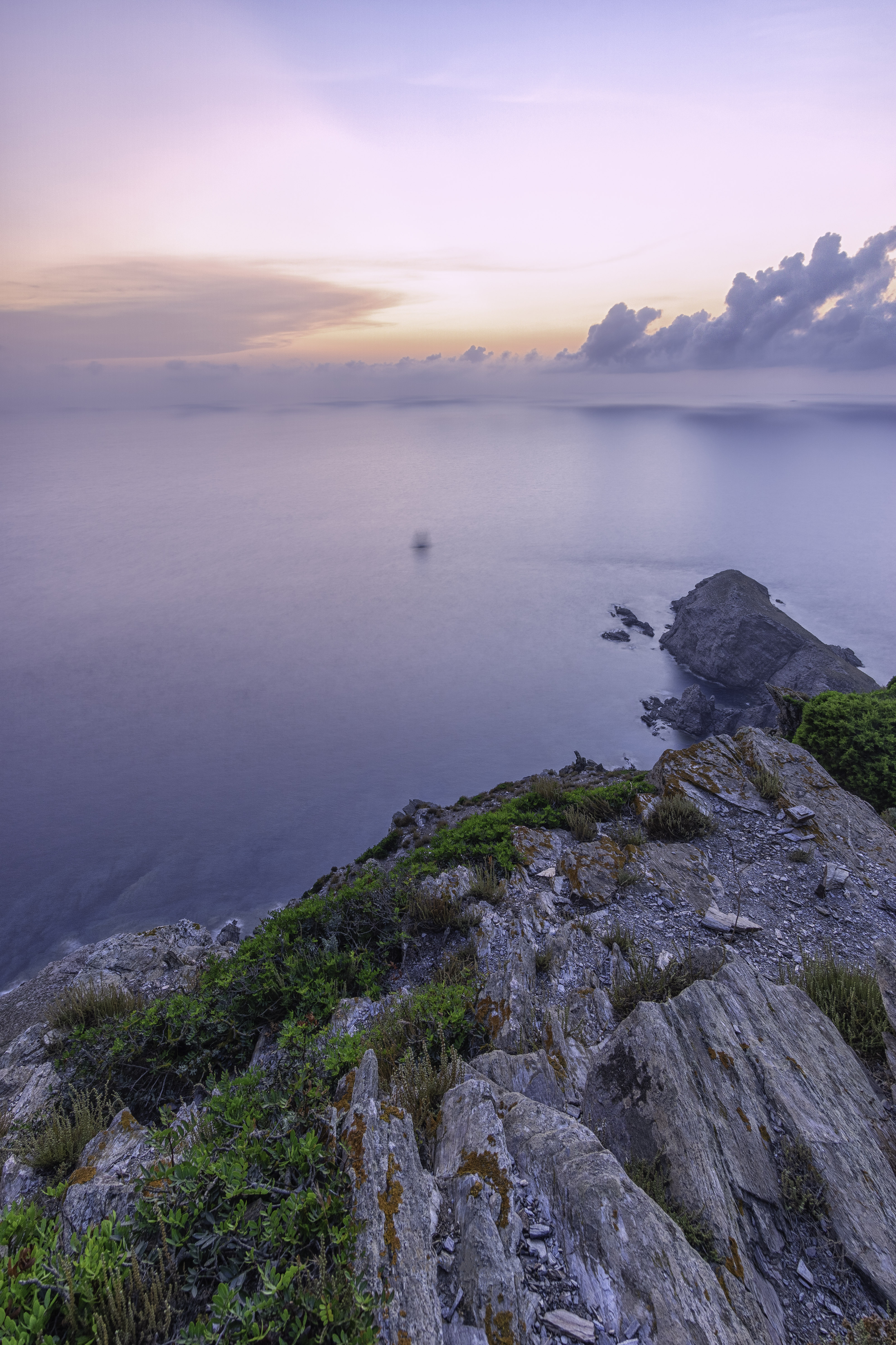 Sul promontorio a 200 mt dal mare